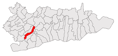 Categorie:Hărţi ale judeţului Călăraşi